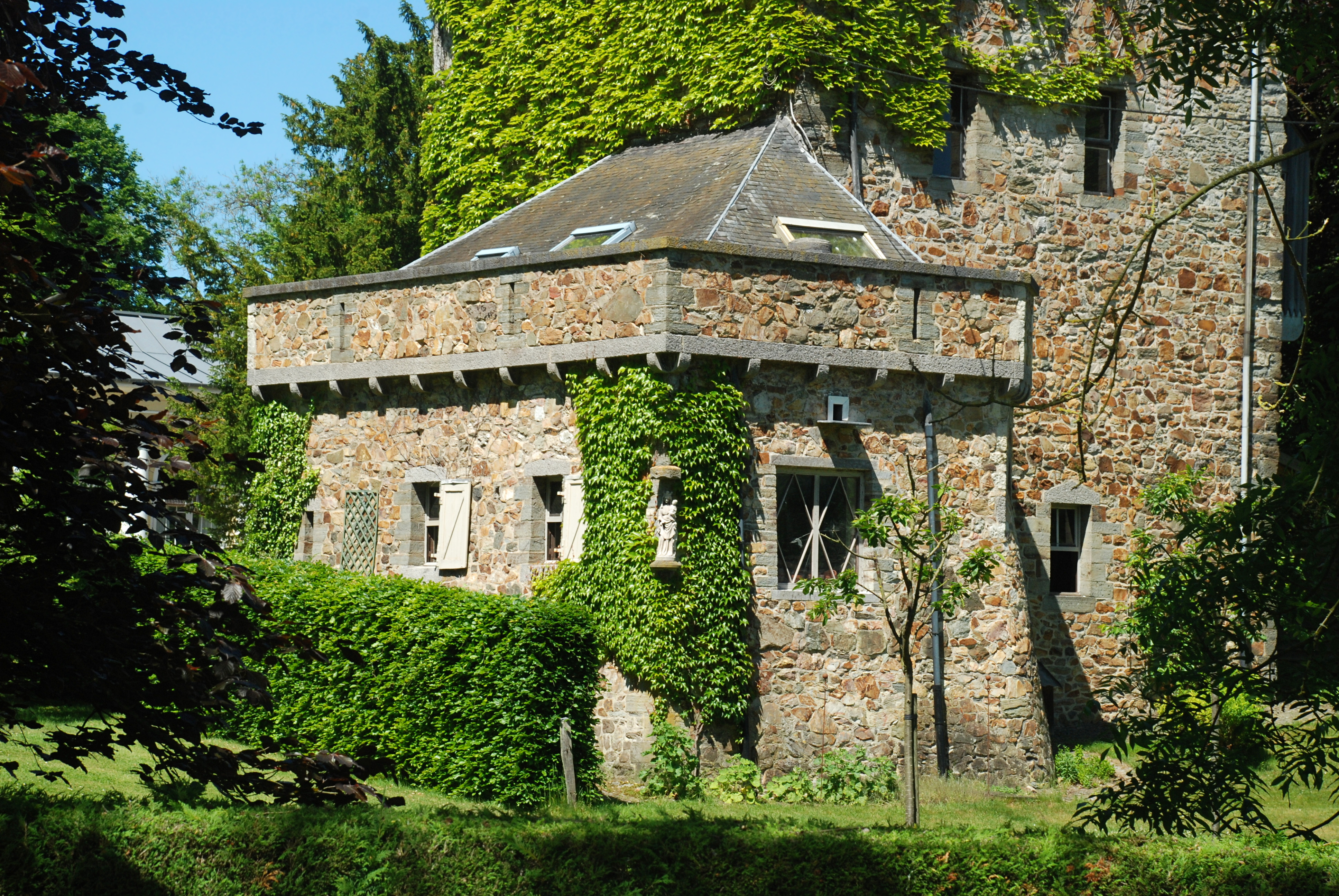 Belgique - Brabant wallon - Mont-Saint-Guibert - Hévillers - Donjon de Bierbais